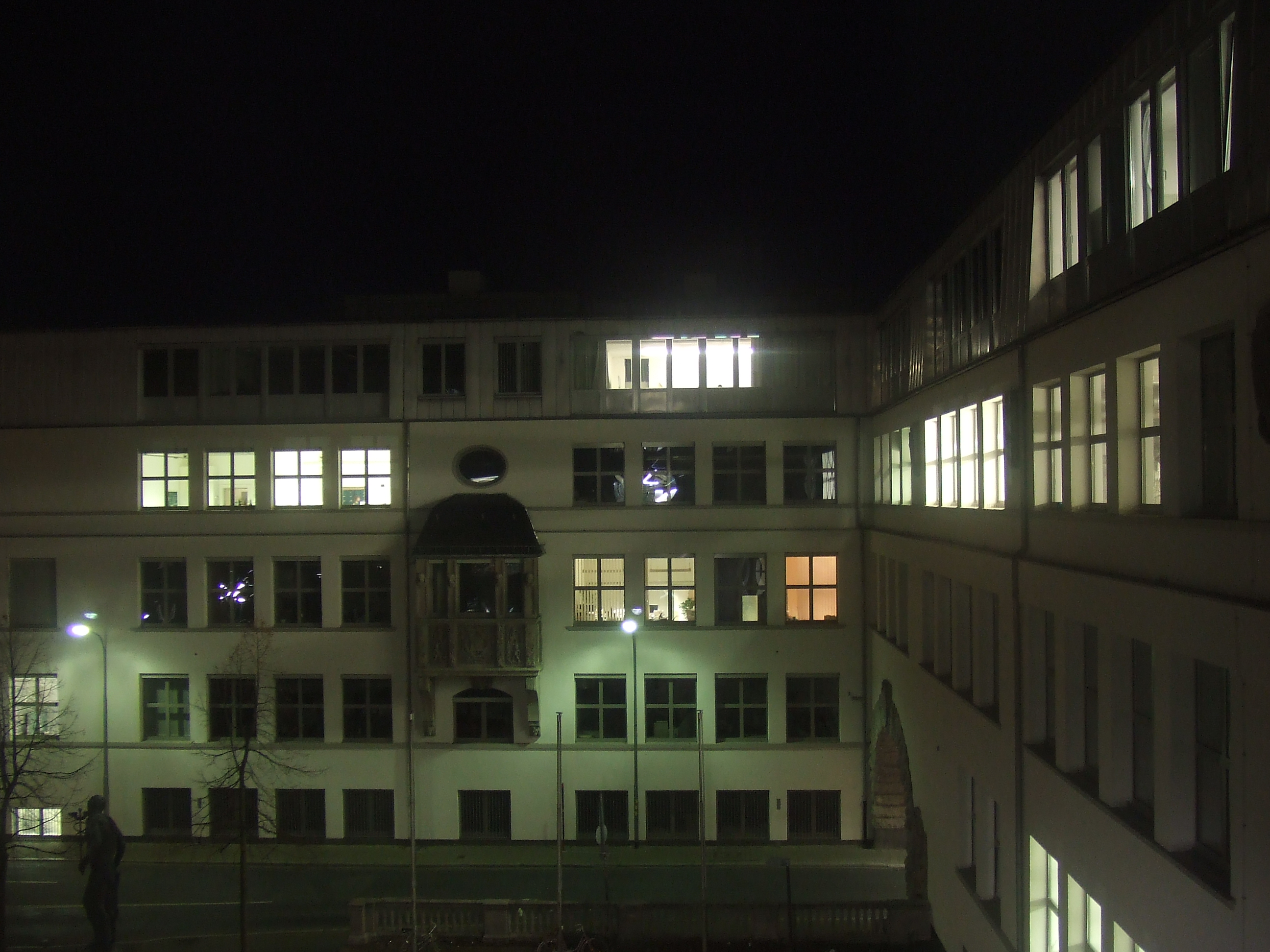 HfG Offenbach, 2007. Architekt: Hugo Eberhardt